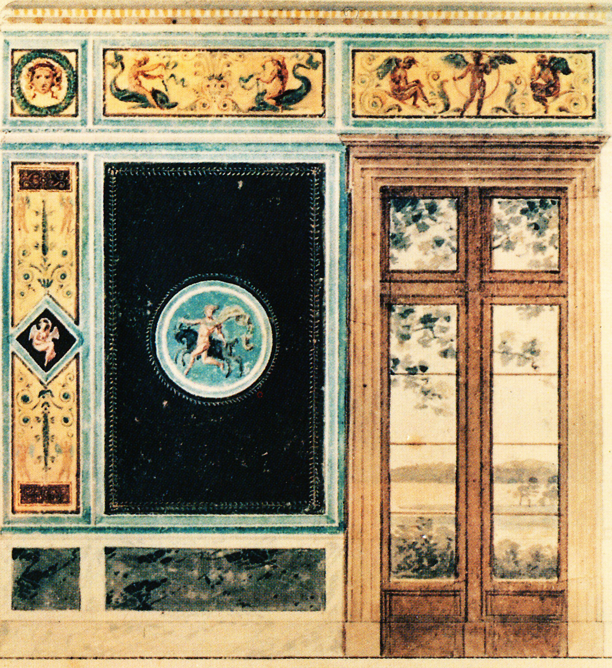 Carl Friedrich Schinkel Entwurf zum Südzimmer im Casino Klein Glienicke 1824 Fenstertür